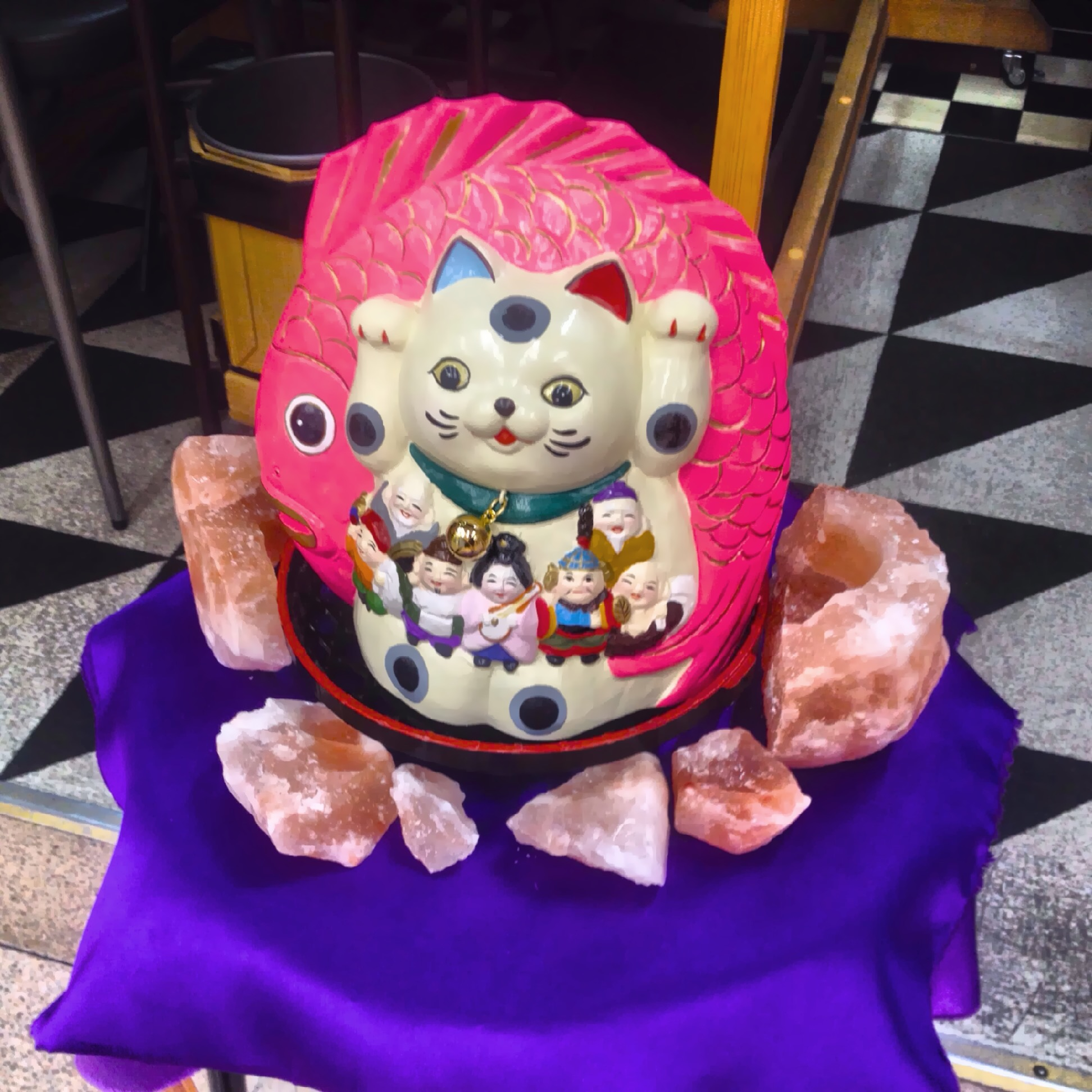 招き猫 (Maneki Neko)